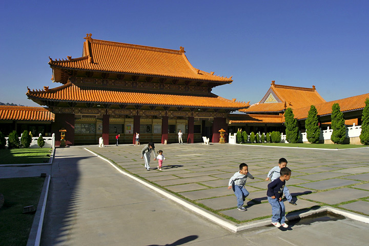 Hsi Lai Temple